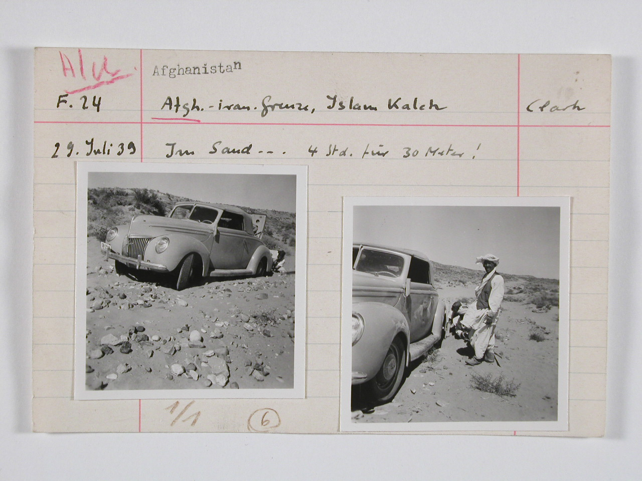 Afghanistan, Islam Kaleh (Eslam Qal'eh): Auto; Karteikarte: Auto in Felsenlandschaft